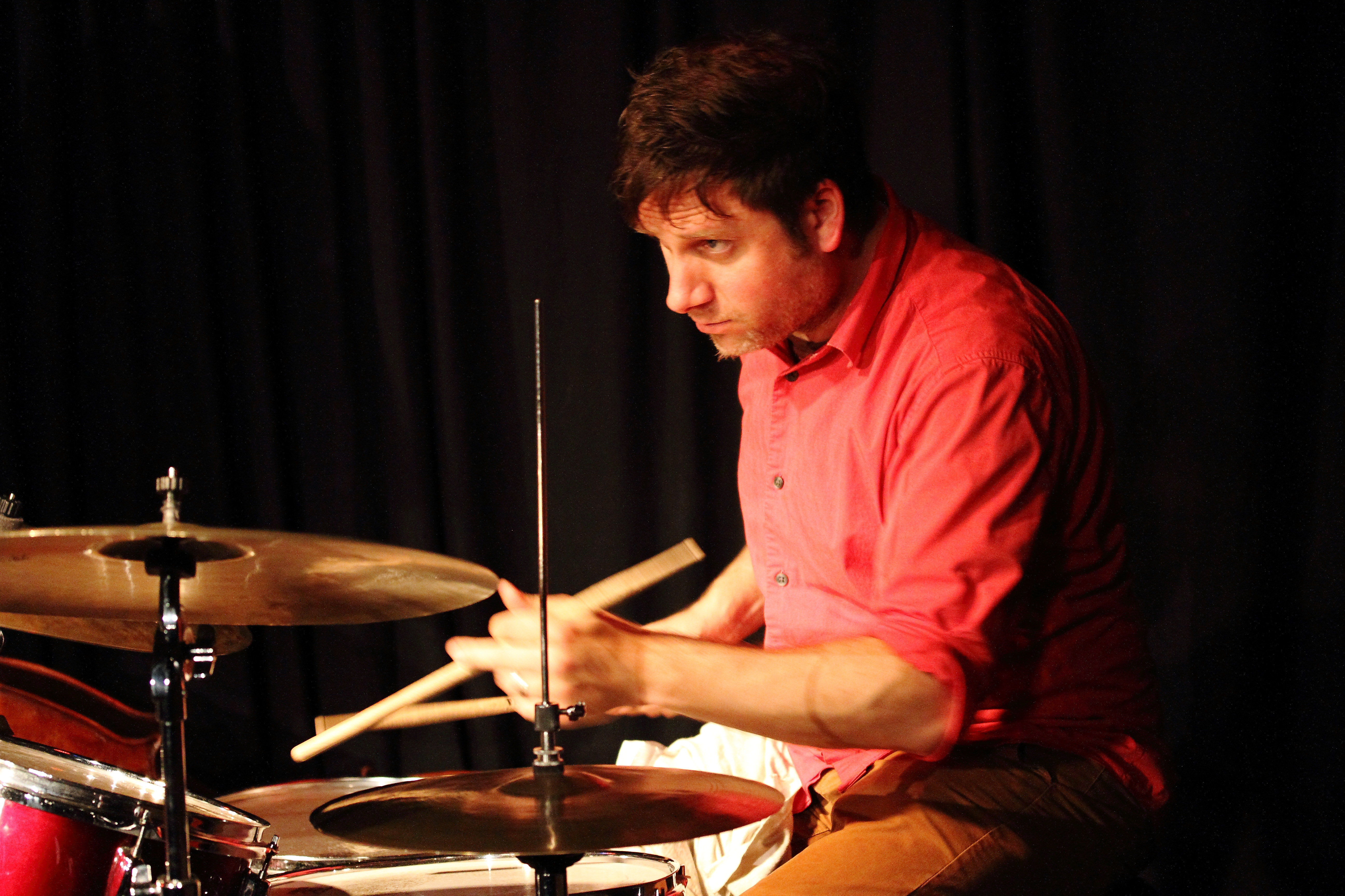 The Rempis Percussion Quartet mit Dave Rempis (sax), Ingebrigt Håker Flaten (b), Tim Daisy (dr) & Frank Rosaly (dr) im Club W71 in Weikersheim.